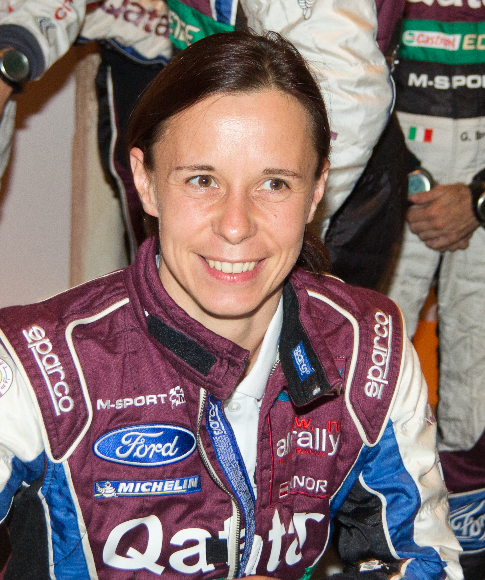 ADAC Rallye Deutschland 2013 - Empfang der Stadt Köln - Ilka Minor